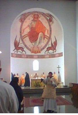 Chevetogne, Église latine.